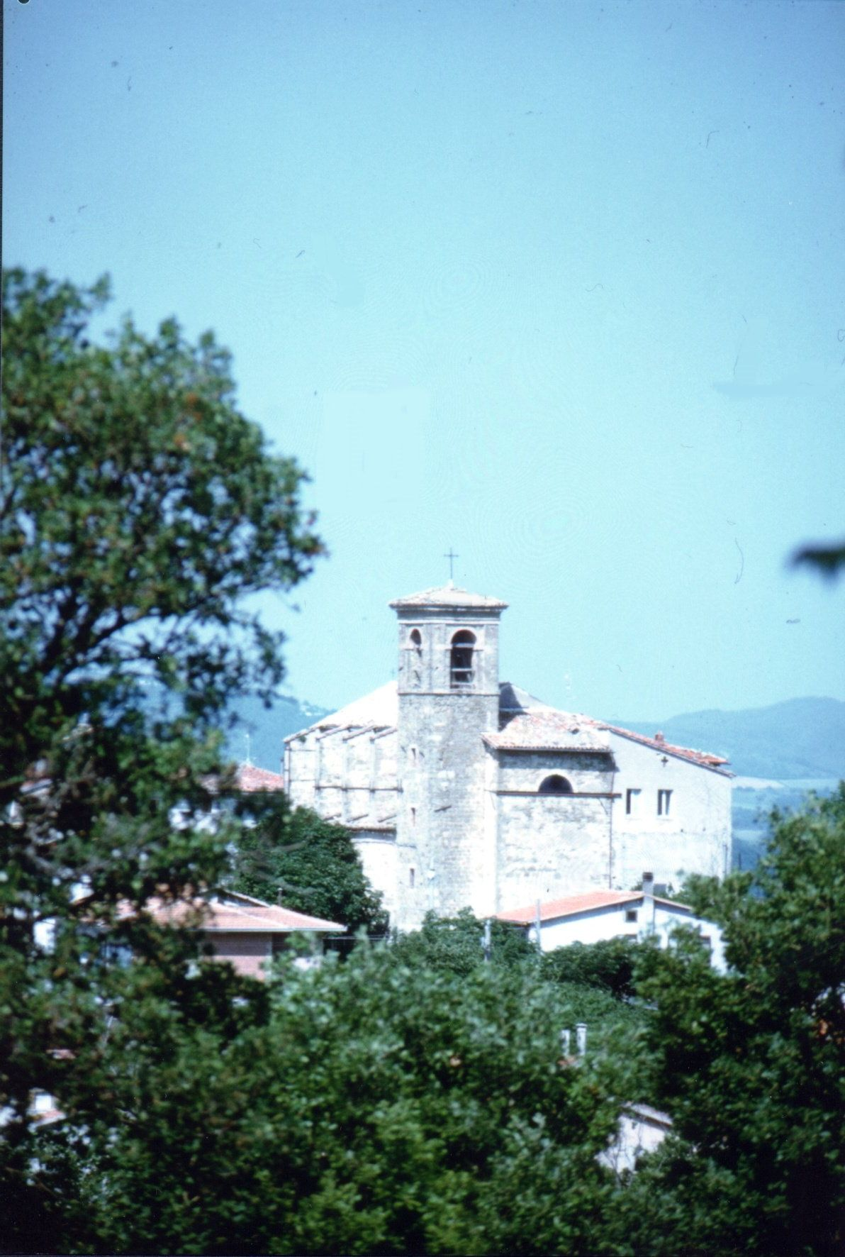 Pieve di Compresseto, frazione di Gualdo Tadino: la chiesa parrocchiale dell'Assunzione di Maria Vergine.